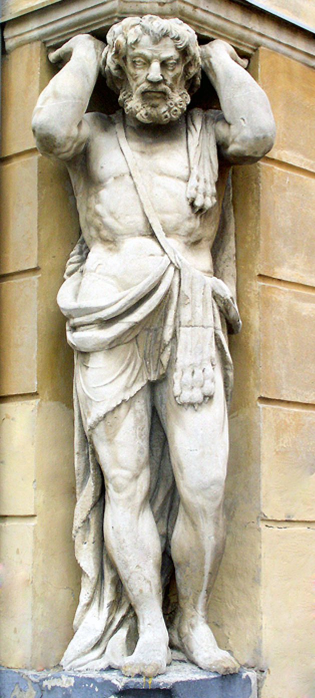 Socha "Corgoňa" sa nachádza na rohu dvojpodlažnej budovy - Kluchovho paláca, na Východnej a Samovej ulici. Táto zaujímavá socha dosahuje výšku jedného podlažia Kluchovho paláca v Nitre. Vavrincom Dunajským bola zhotovená v 20. rokoch 19. storočia. Hrdinom legendy je Corgoň (socha Atlanta). Atlanta v umení zobrazovali ako na ramenách drží zemeguľu alebo budovu. Nitriansky Atlant symbolicky podopiera podlažie jednej budovy.